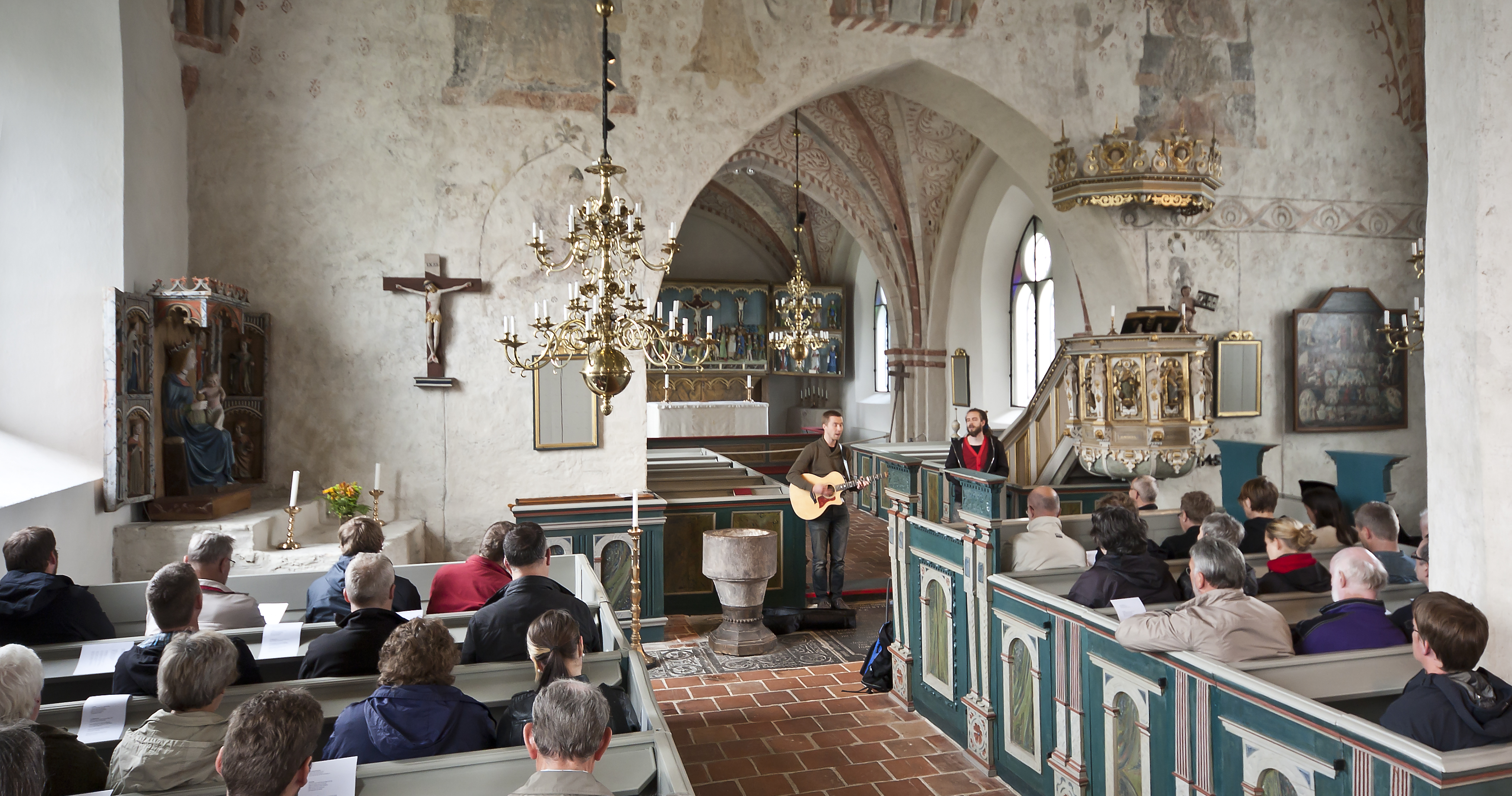 Andakt i Sankt Olofs kyrka i byn Sankt Olof i Simrishamns kommun.